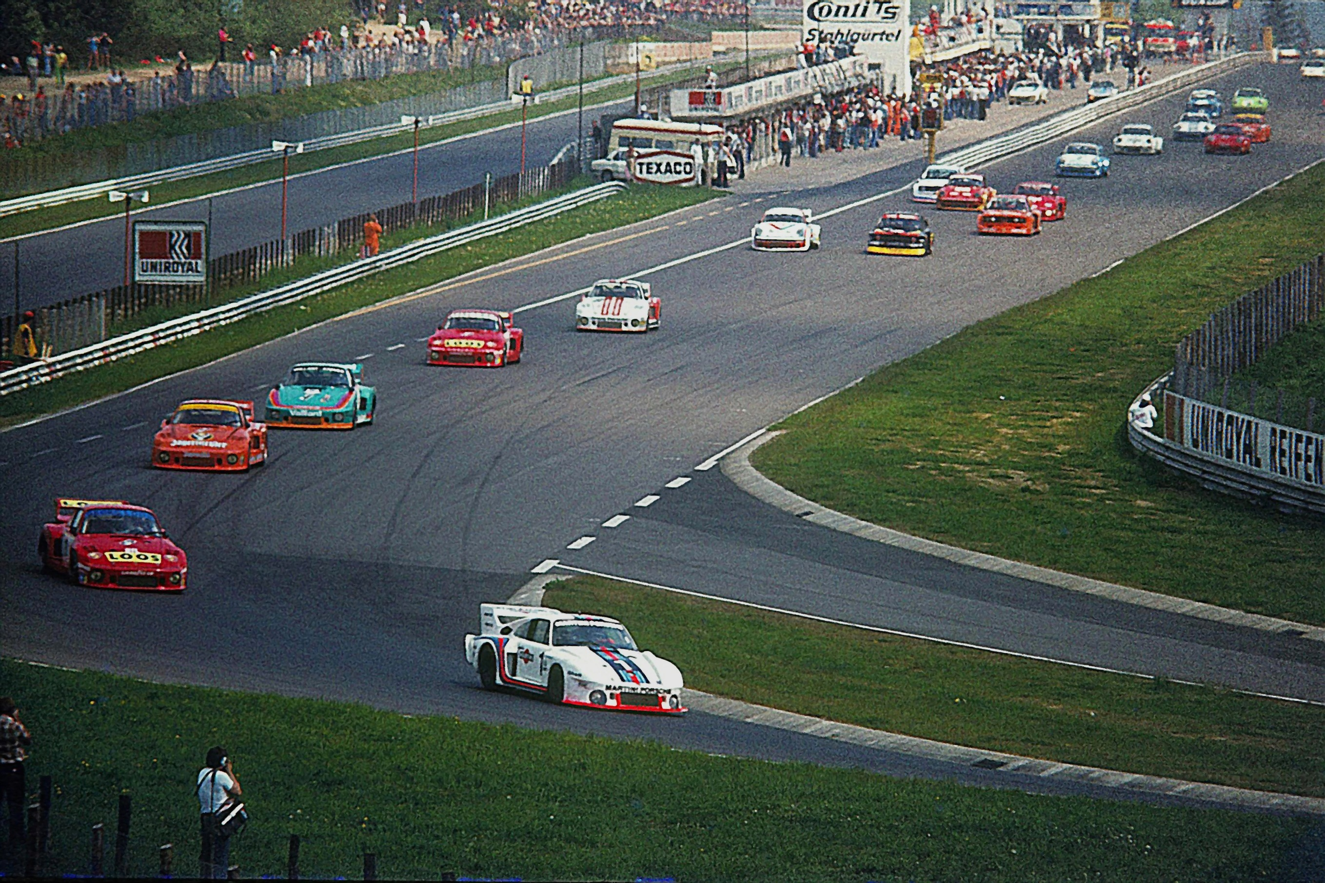 Start zum 1000-km-Rennen auf dem Nürburgring, vorn Jackie Ickx auf Porsche 935, gefolgt von Rolf Stommelen.